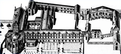 l'abbaye Saint-Jouin-de-Marnes au fin du 17ème siècle